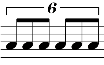 Sextool